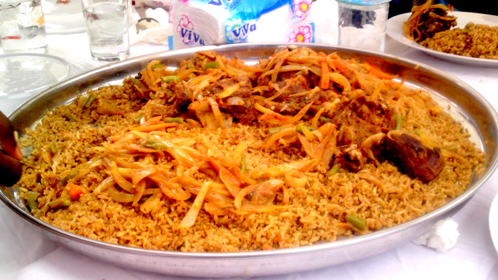 Riz gras rouge à la viande de boeuf